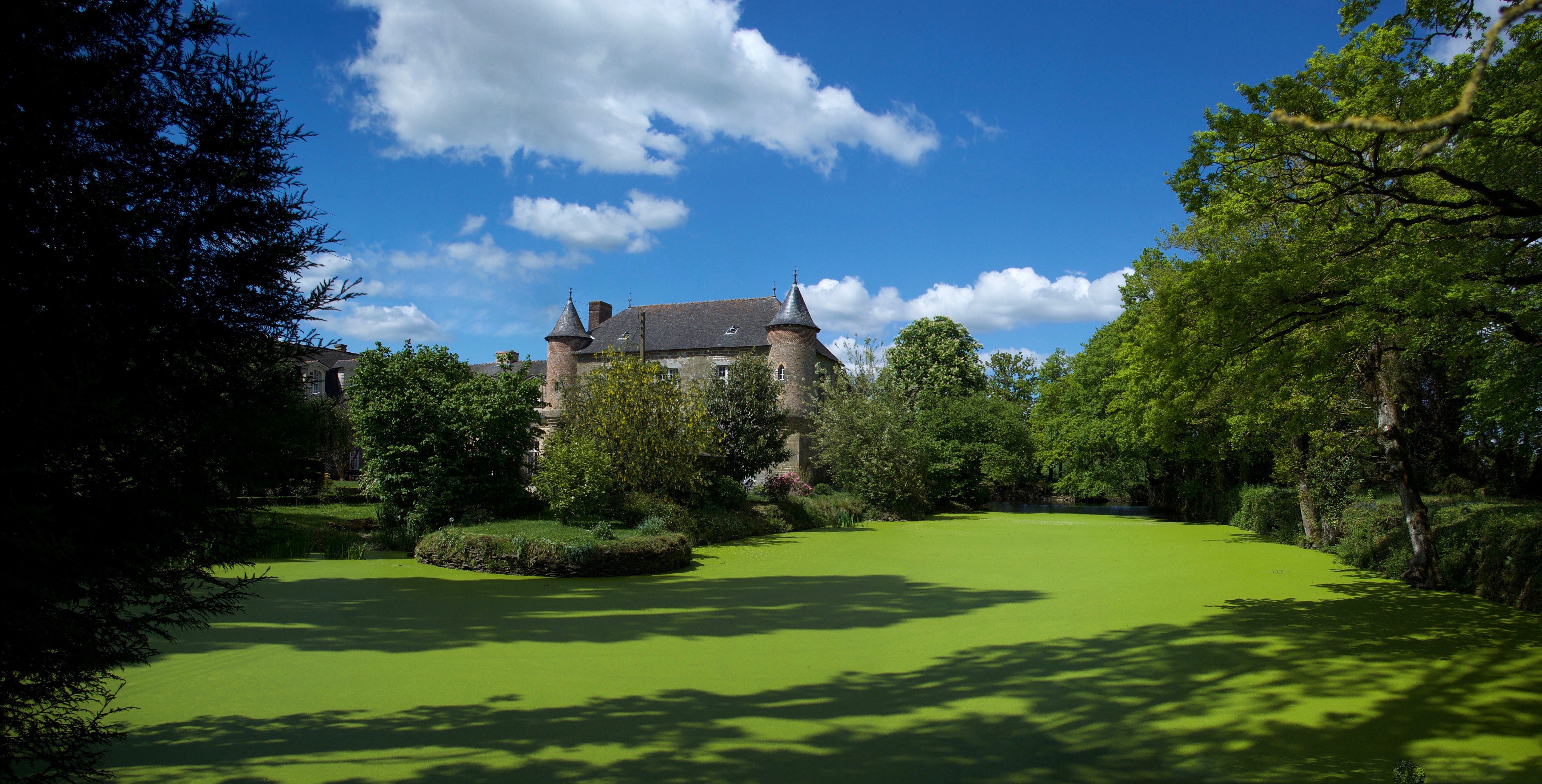 Le château du Gué à Servon-sur-vilaine 35